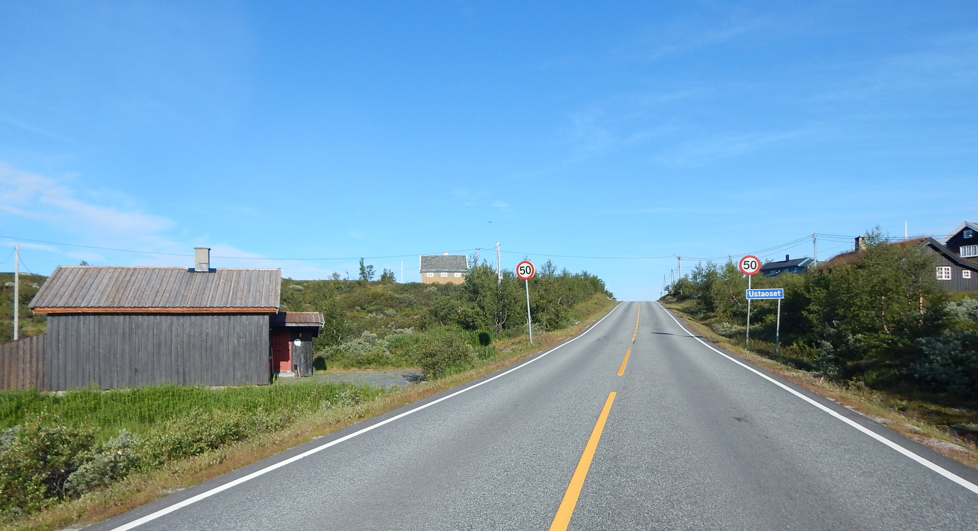 Riksvei 7 ved Ustaoset